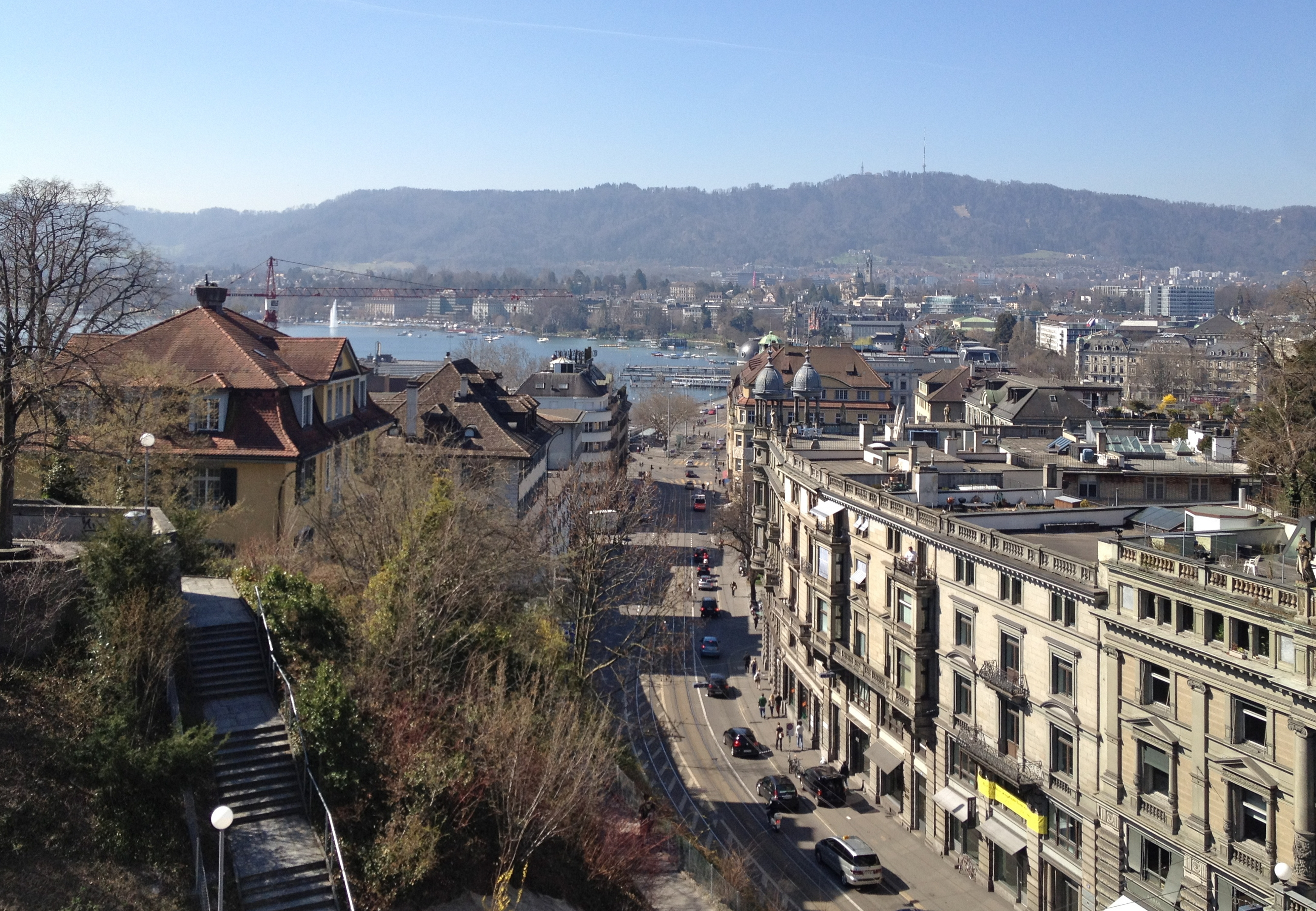 Blick über das Bellevue (Zürich) und das untere Seebecken zum Üetliberg